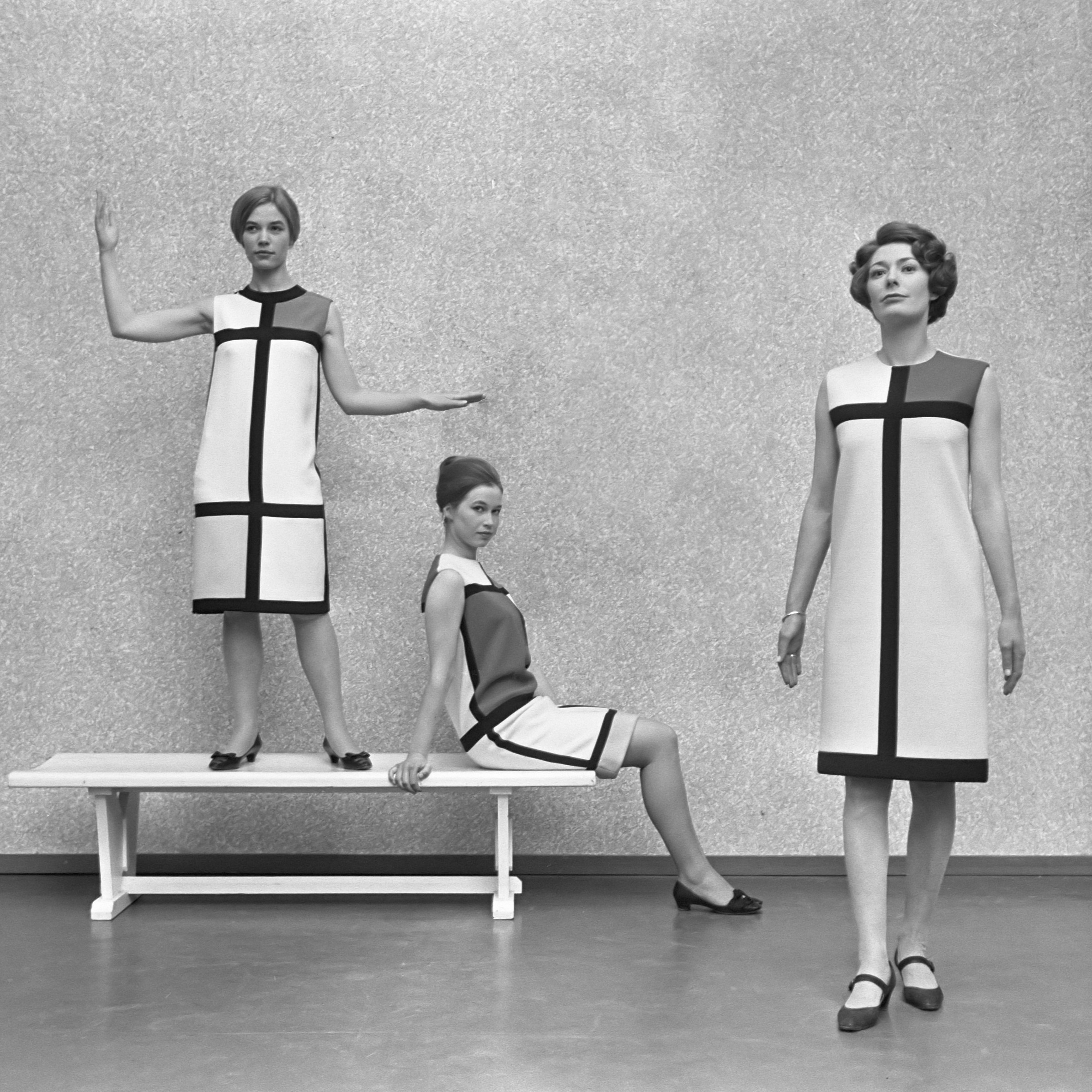 Mondriaanmode uit Parijs, japonnen gemaakt door Yves St. Laurent , de modellen in Haagse Gemeente Museum 12 januari 1966. Dit is een bewerkte versie van de originele foto waarbij het schilderij van Mondriaan weggeretoucheerd is